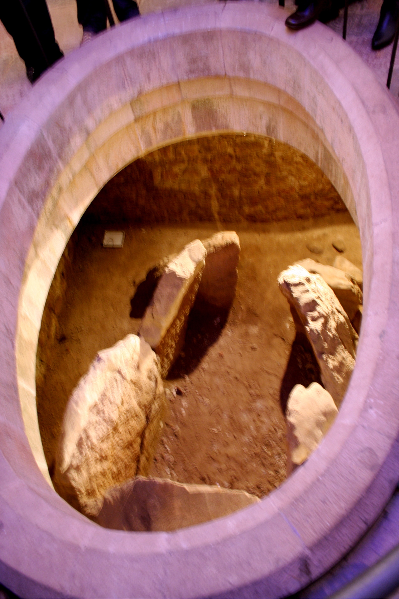 Dolmen de la Santa Cruz. C. Onís Asturias